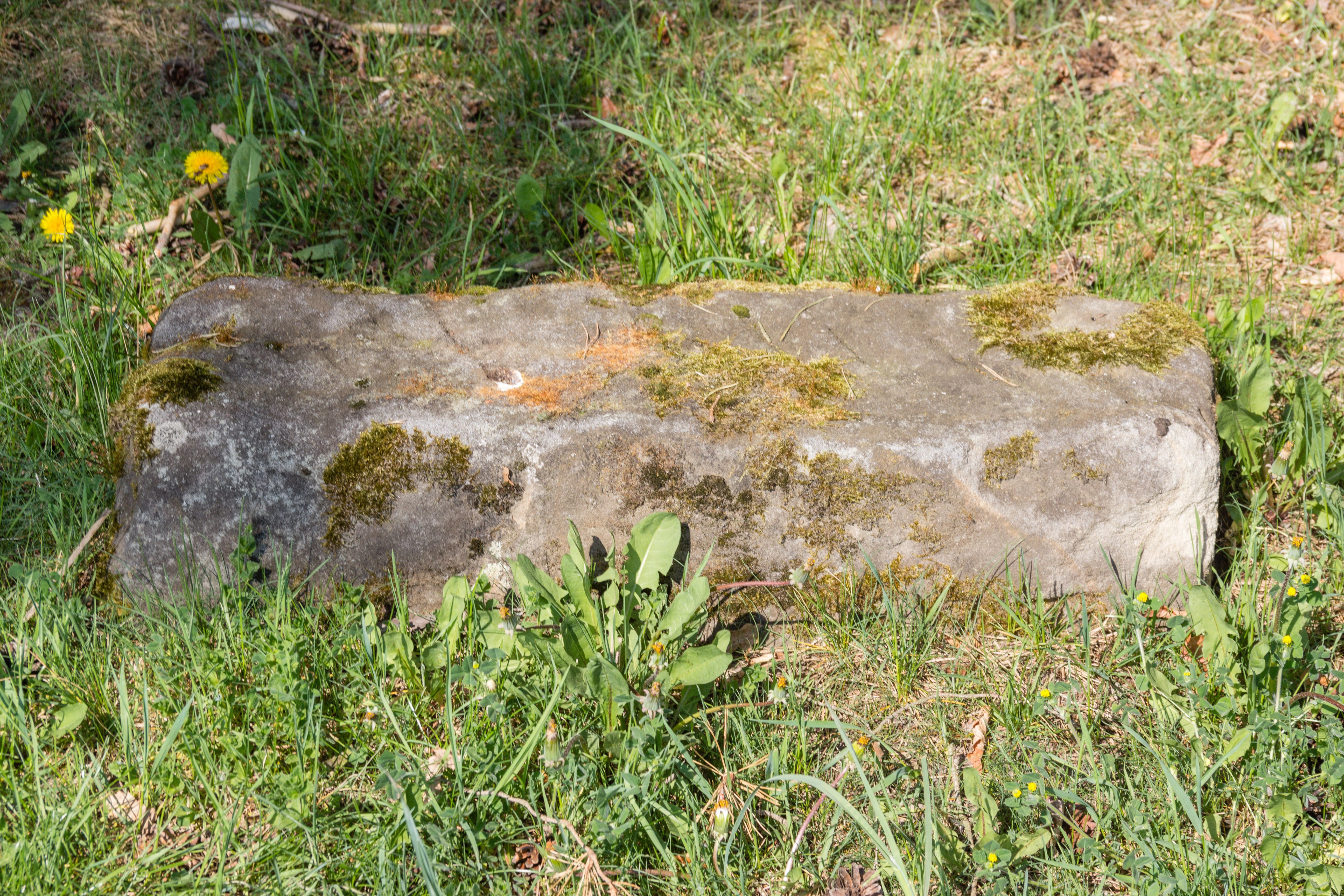 Steinkreuze, Lauf an der Pegnitz, Simmonshofen am Höllweiher, Steinbalken